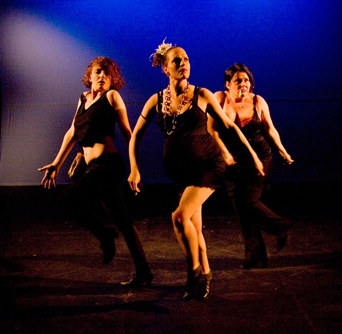 ההצגה איכה